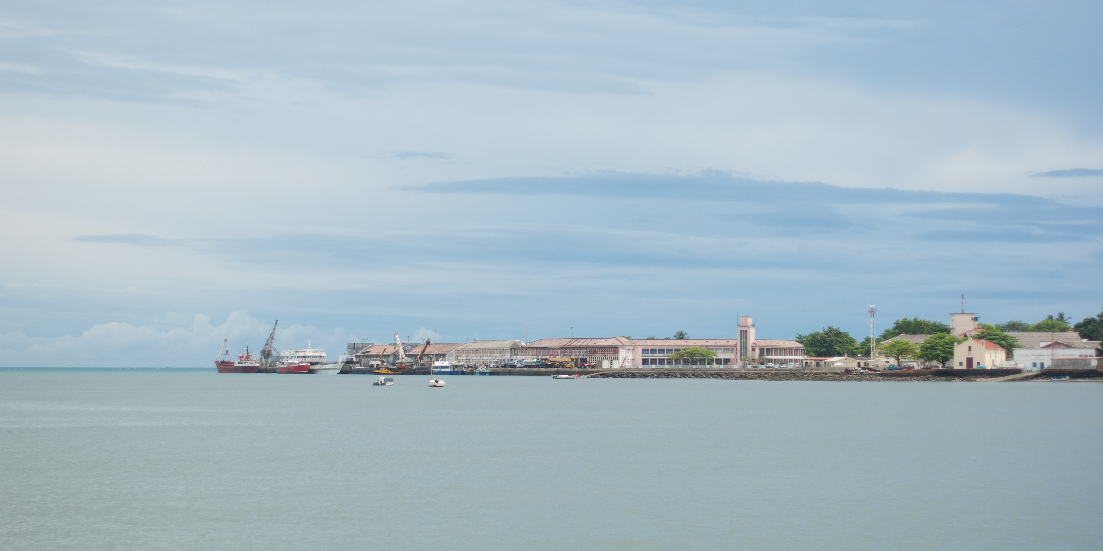 2011-SaoTome-6